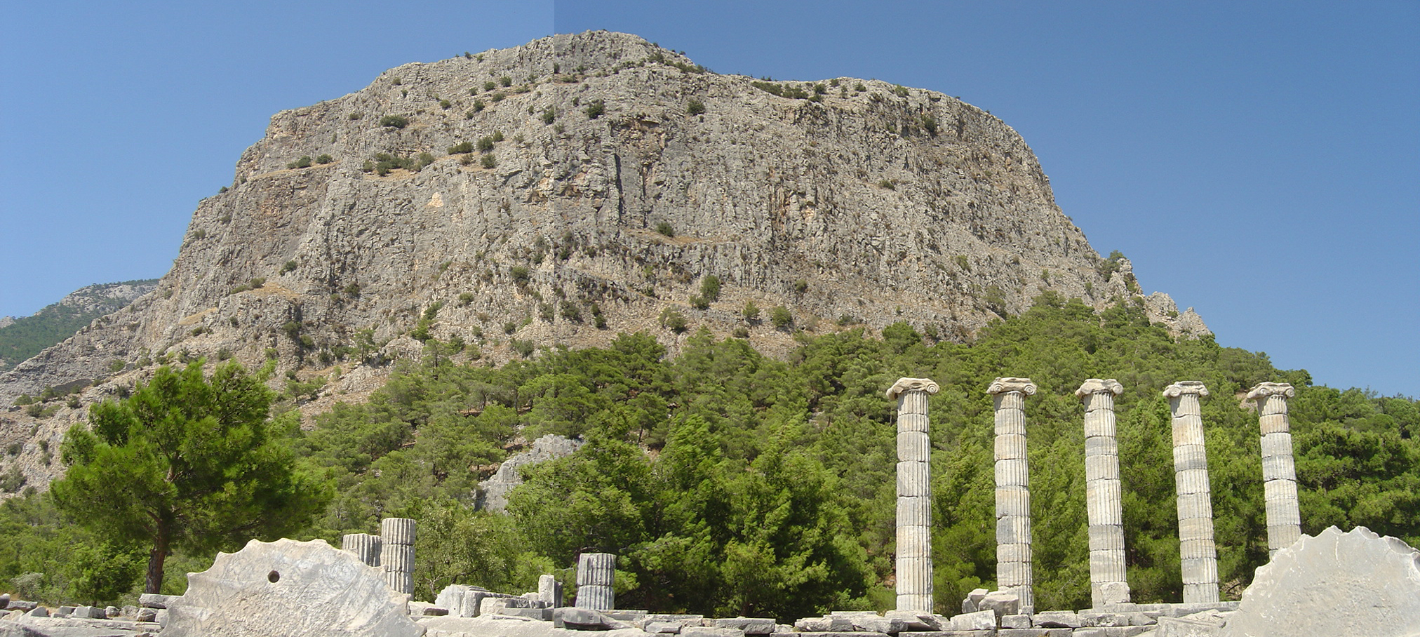 Prienne théâtre romain (roman theater), vu sur la colline (image e. Bougaud)